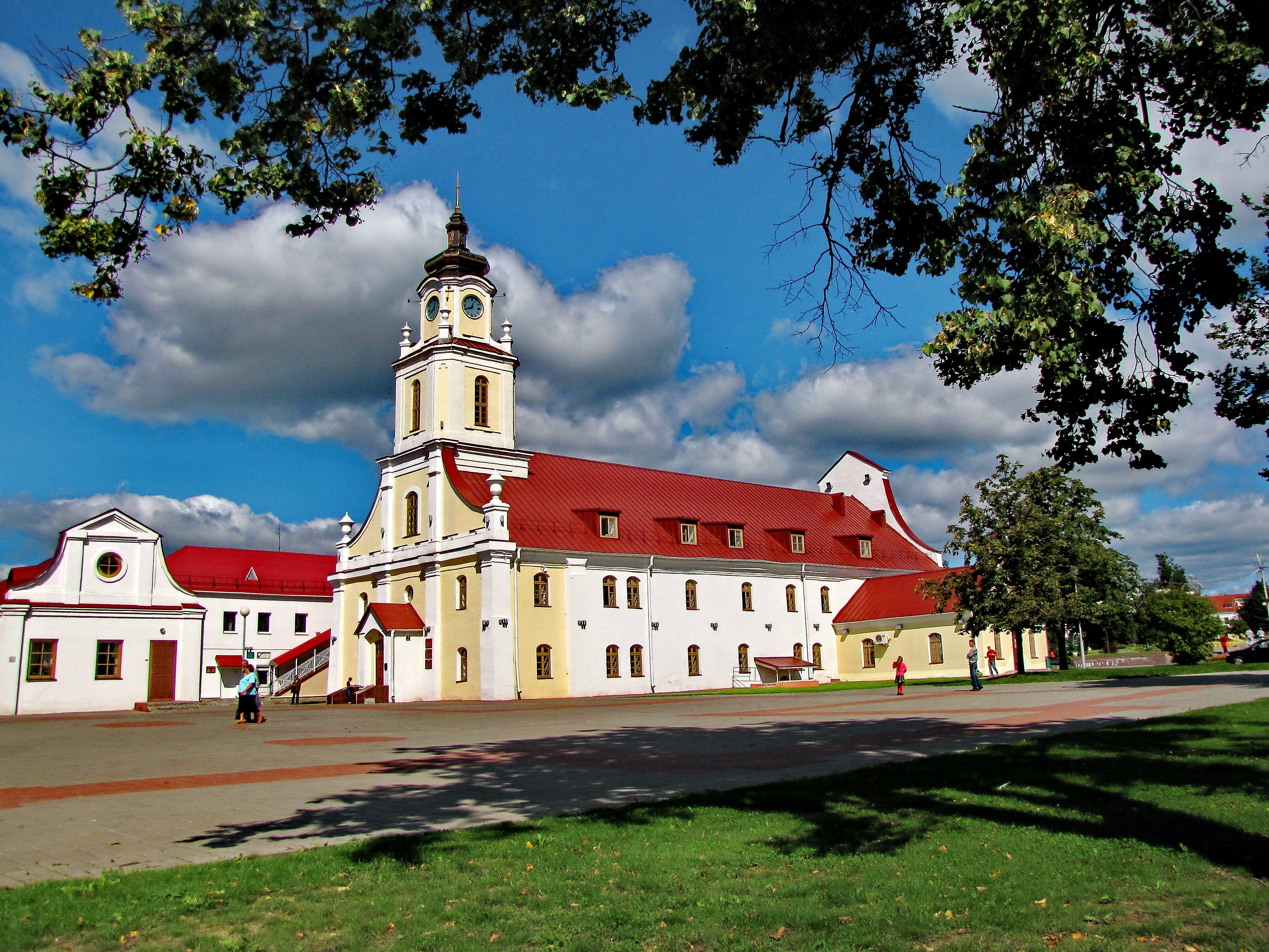 Беларуская (тарашкевіца): Комплекс былога езуіцкага калегіюму. г. Ворша This is a photo of Belarusian heritage monument. Reference number: 212Г000113 ( WLM)